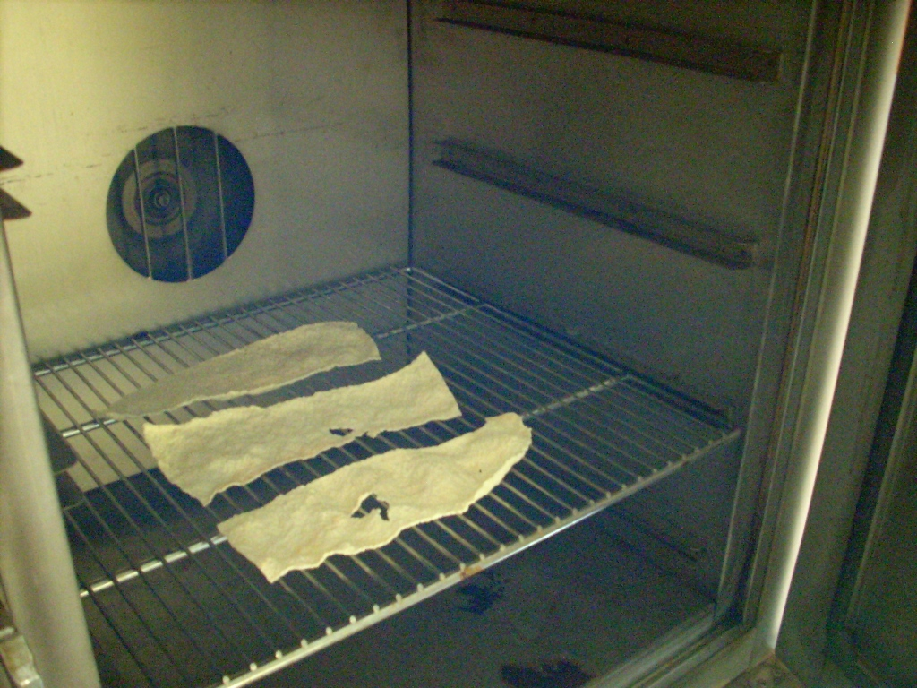 Pengeringan karet dalam oven untuk menentukan kadar karet kering